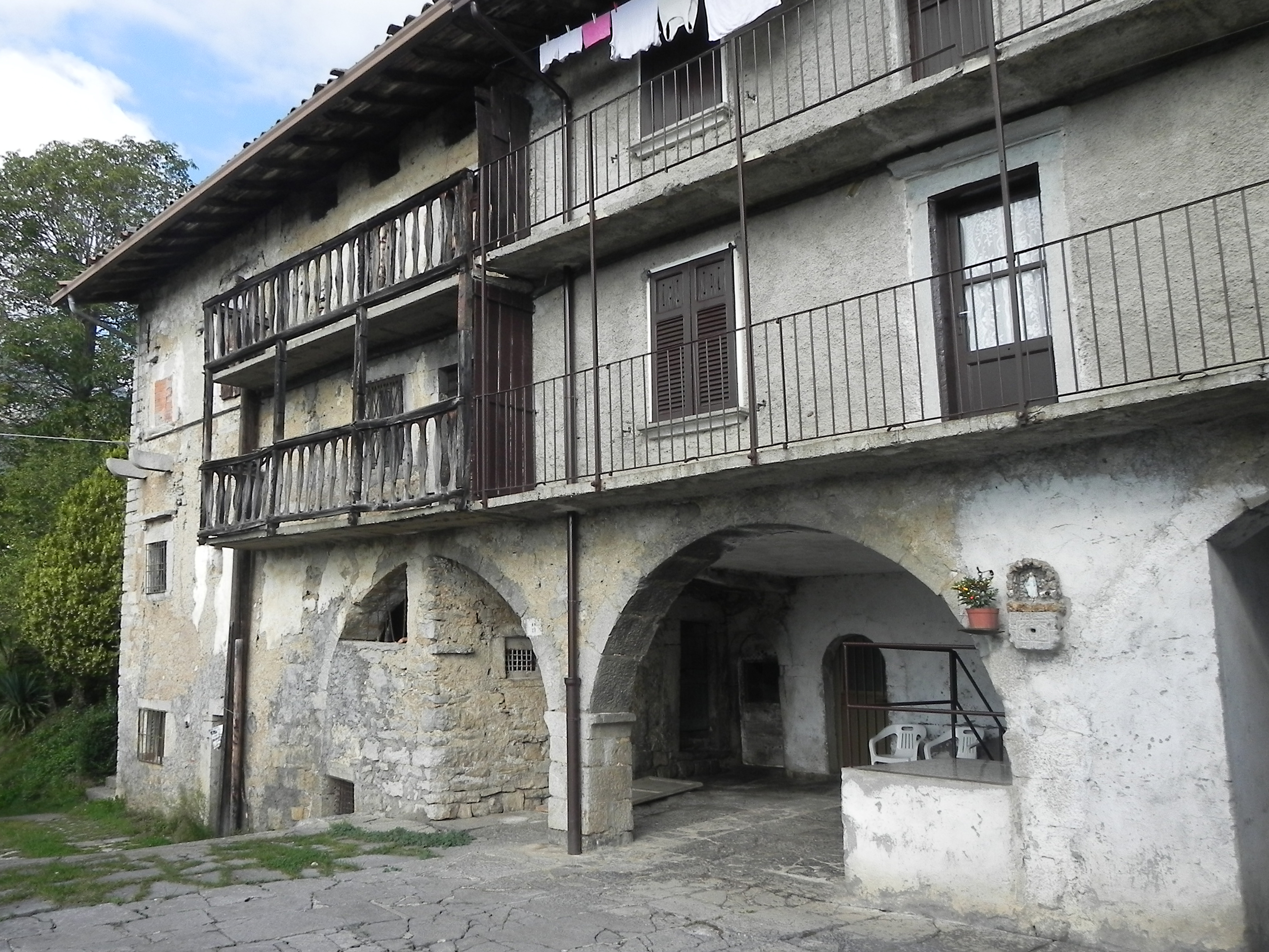 Dettaglio della contrada di Peroli alti - GOONO (BG)